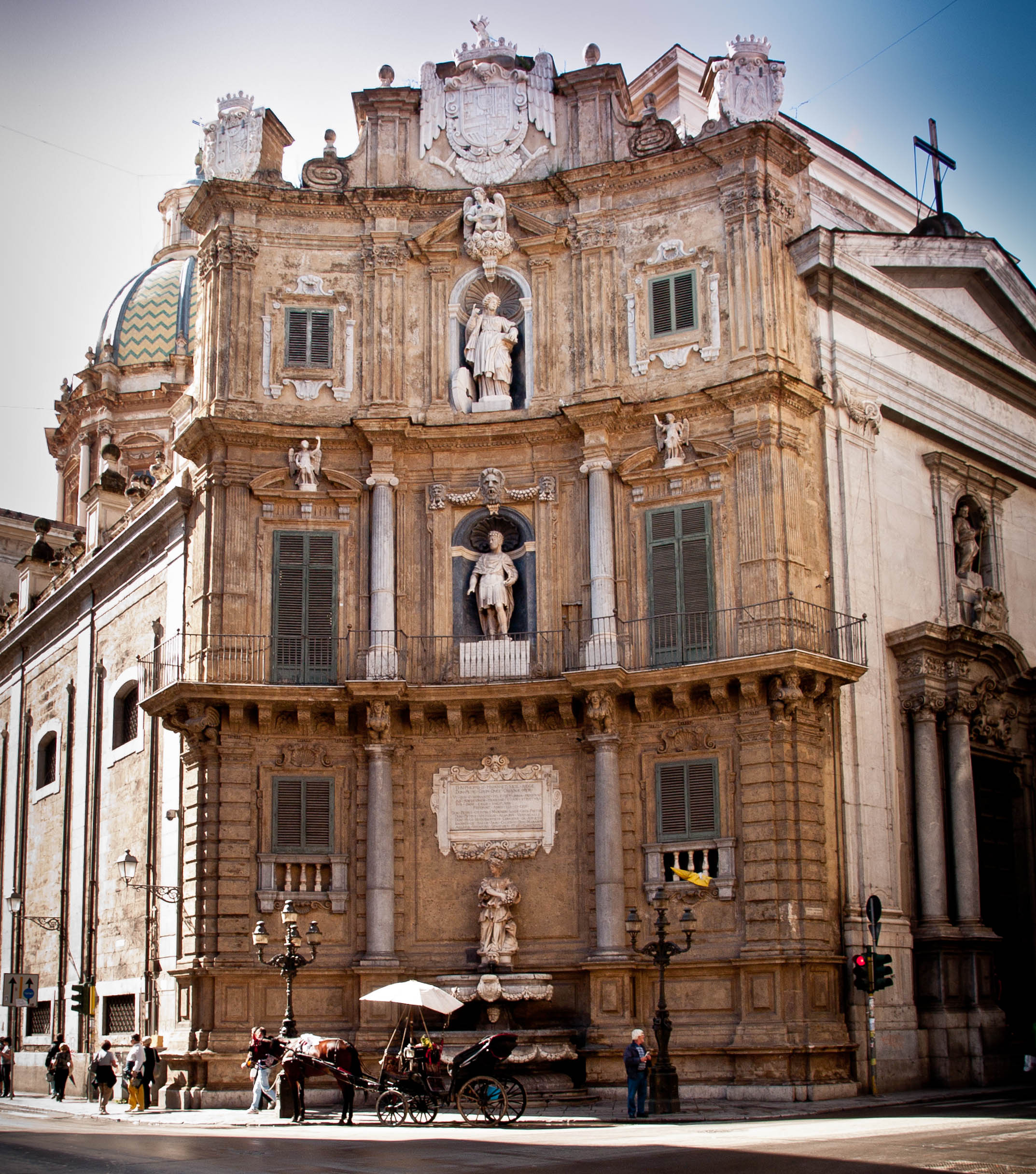 Piazza Quattro Canti in Palermo - South-West corner (Spring).